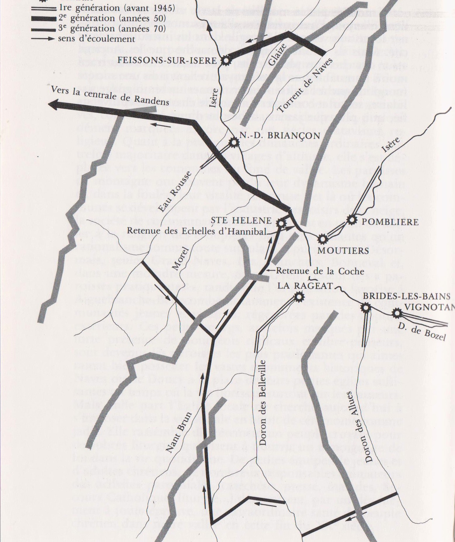 La station de pompage de La Coche, dernier aménagement hydroélectrique au coeur de la Tarentaise